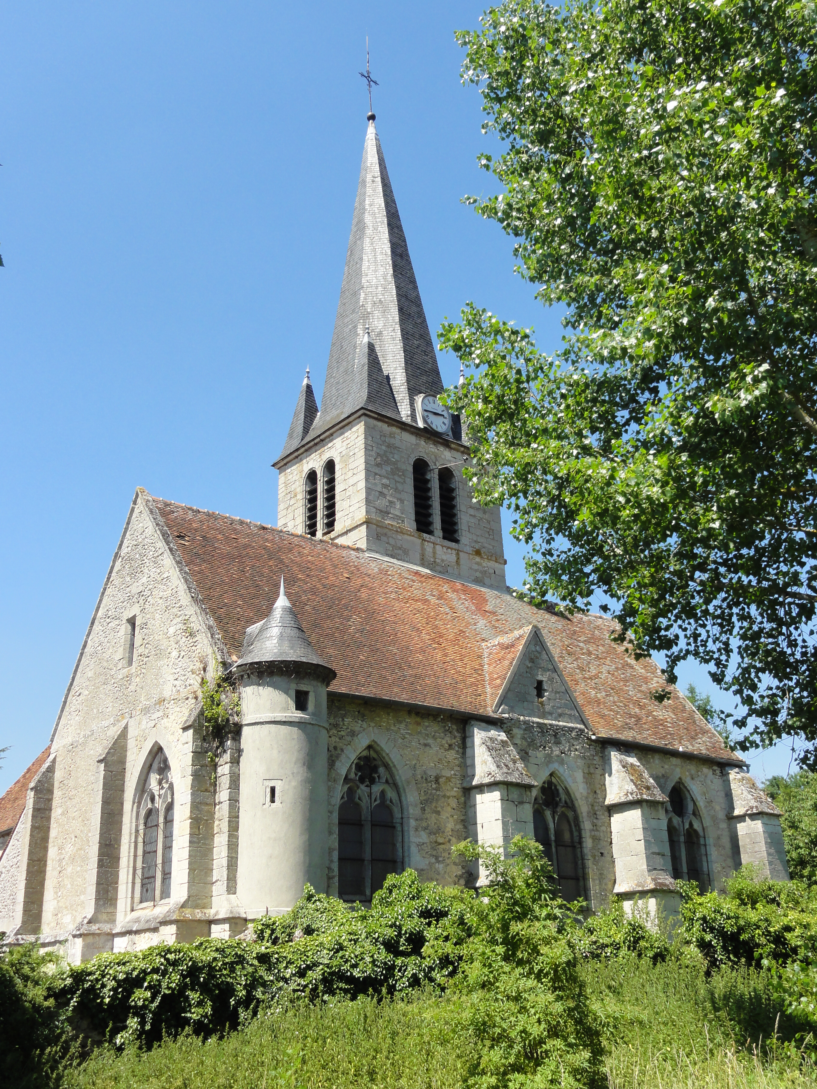 Vue depuis le sud-est.